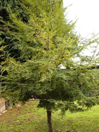 Descripción: Ejemplar joven de coigüe, coihue o roble (Nothofagus dombeyi), árbol siempreverde de Argentina y Chile. Autor: Roberto Bahamonde Lugar: Valdivia, Chile Fecha: 16-05-2006